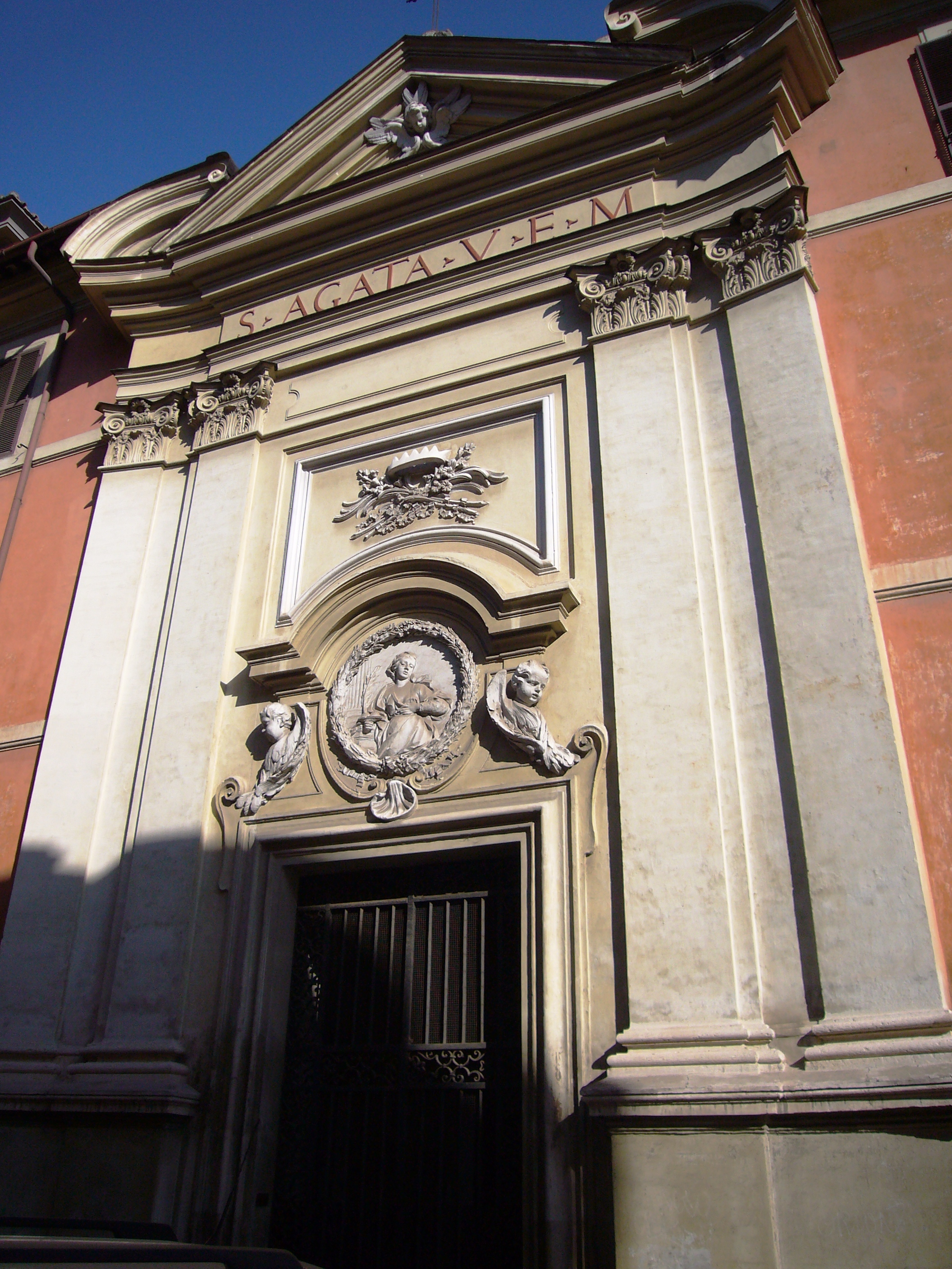 Roma, Sant'Agata dei Goti a via Mazzarino (rione Monti)